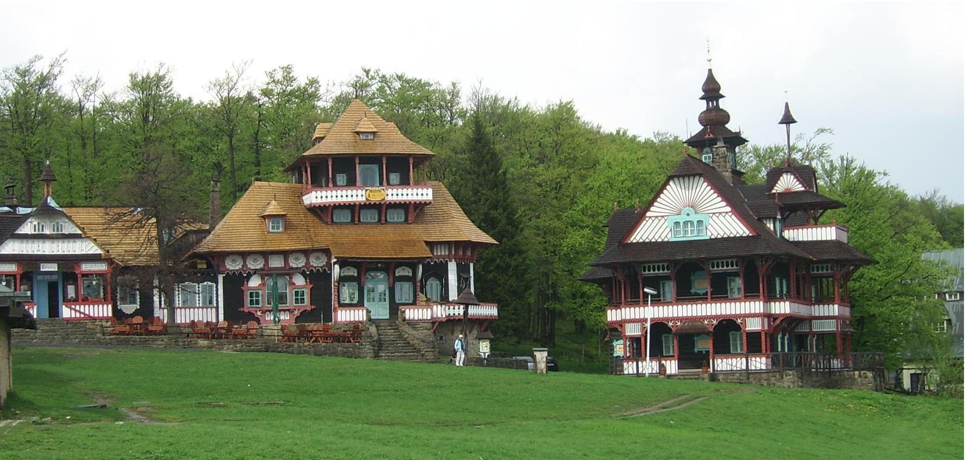 Pustevny